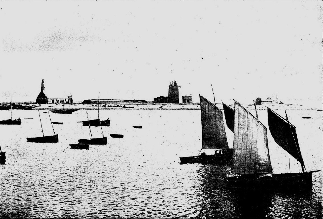 Le port de Camaret-sur-Mer dans le département français du Finistère en 1903.